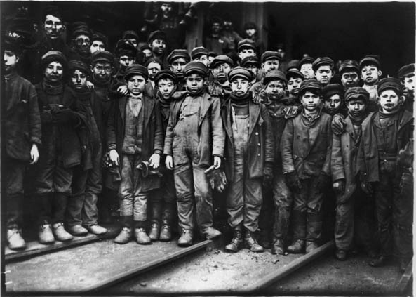 Breaker boys